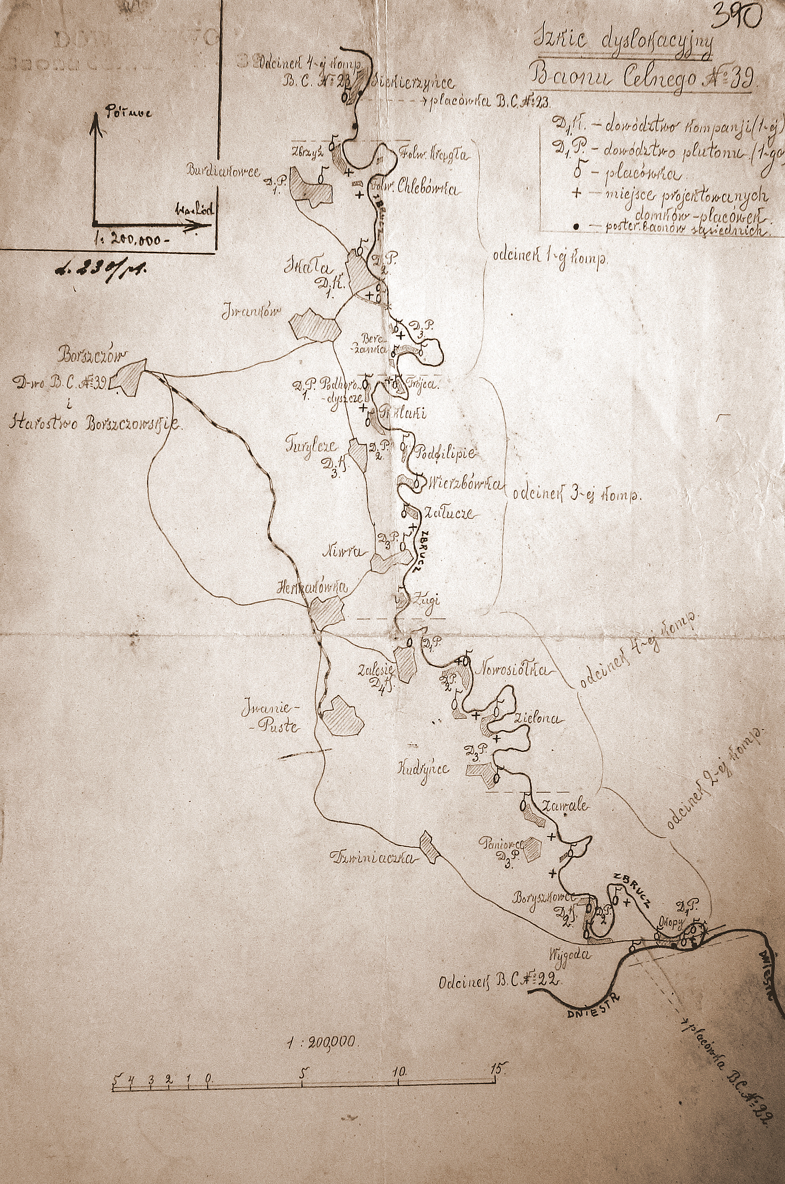 Szkic rozmieszczenia 39 batalionu celnego Borszczów